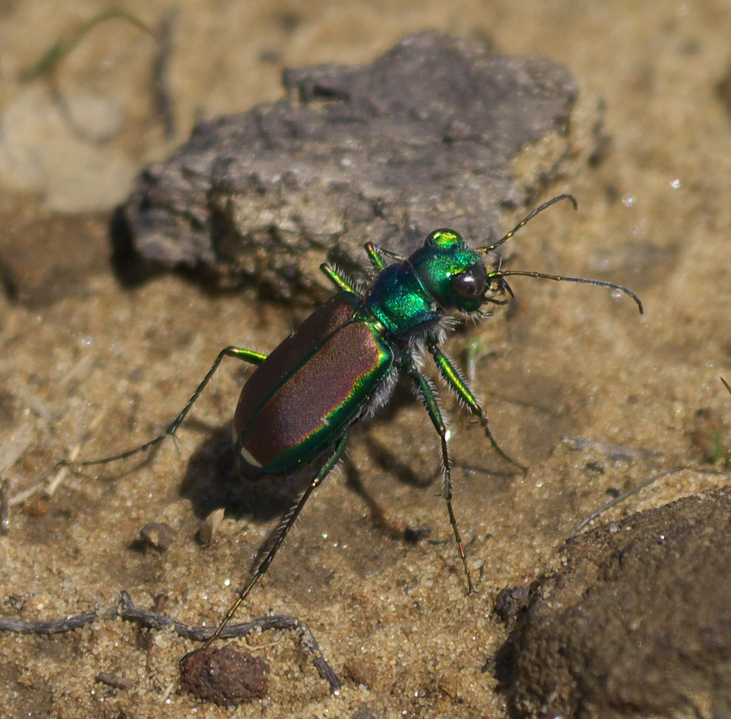 Cicindela splendida, Splendid Tiger Beetle, ID Confidence: 85